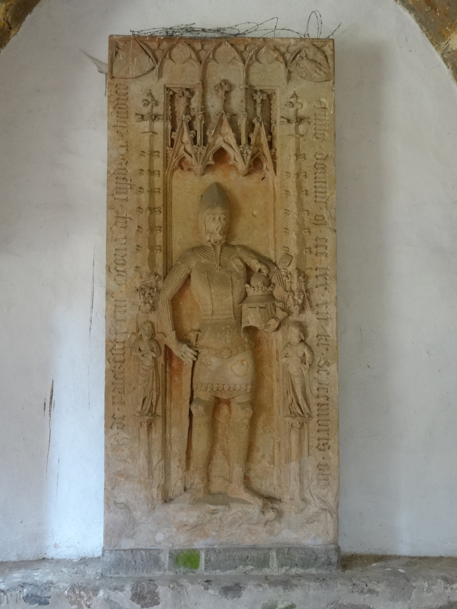 Kloster Arnsburg (Kapitelsaal)